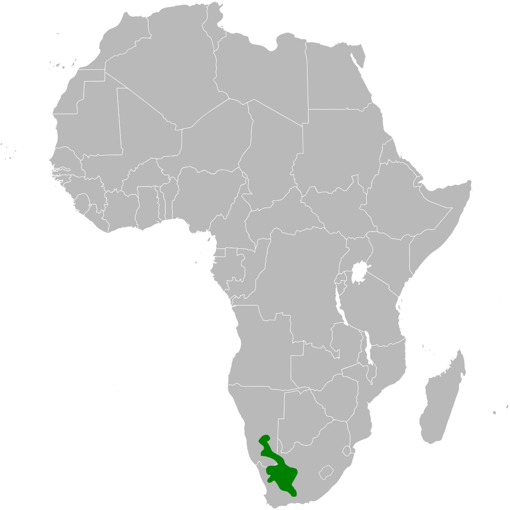 Spizocorys sclateri distribution map; using BlankMap-Africa.svg, based on